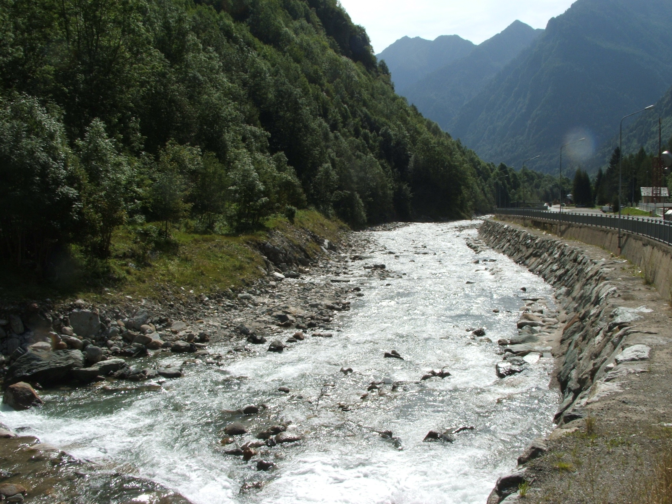 Immagine da Alagna Valsesia - fiume Sesia.